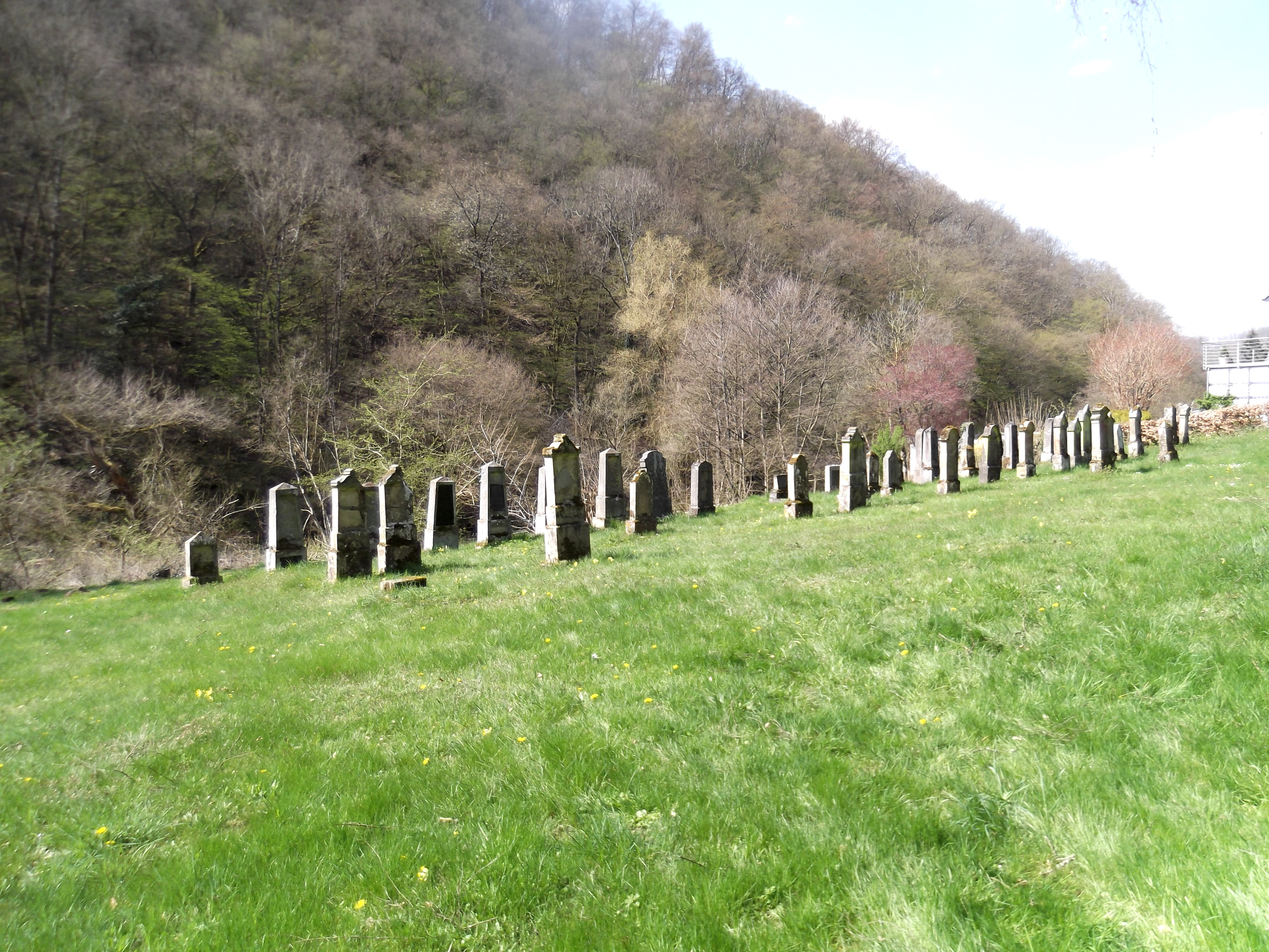 Brodenbach, OT Ehrenburgerthal. Ehemaliger jüdicher Friedhof 2019 nach Rodungarbeiten von angrenzenden Gehölzen.